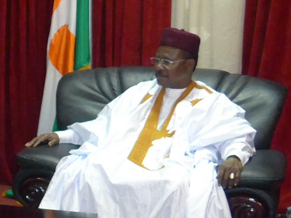 Amadou Salifou, Niger.